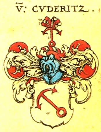 Wappen derer von Lüderitz (Cuderitz)